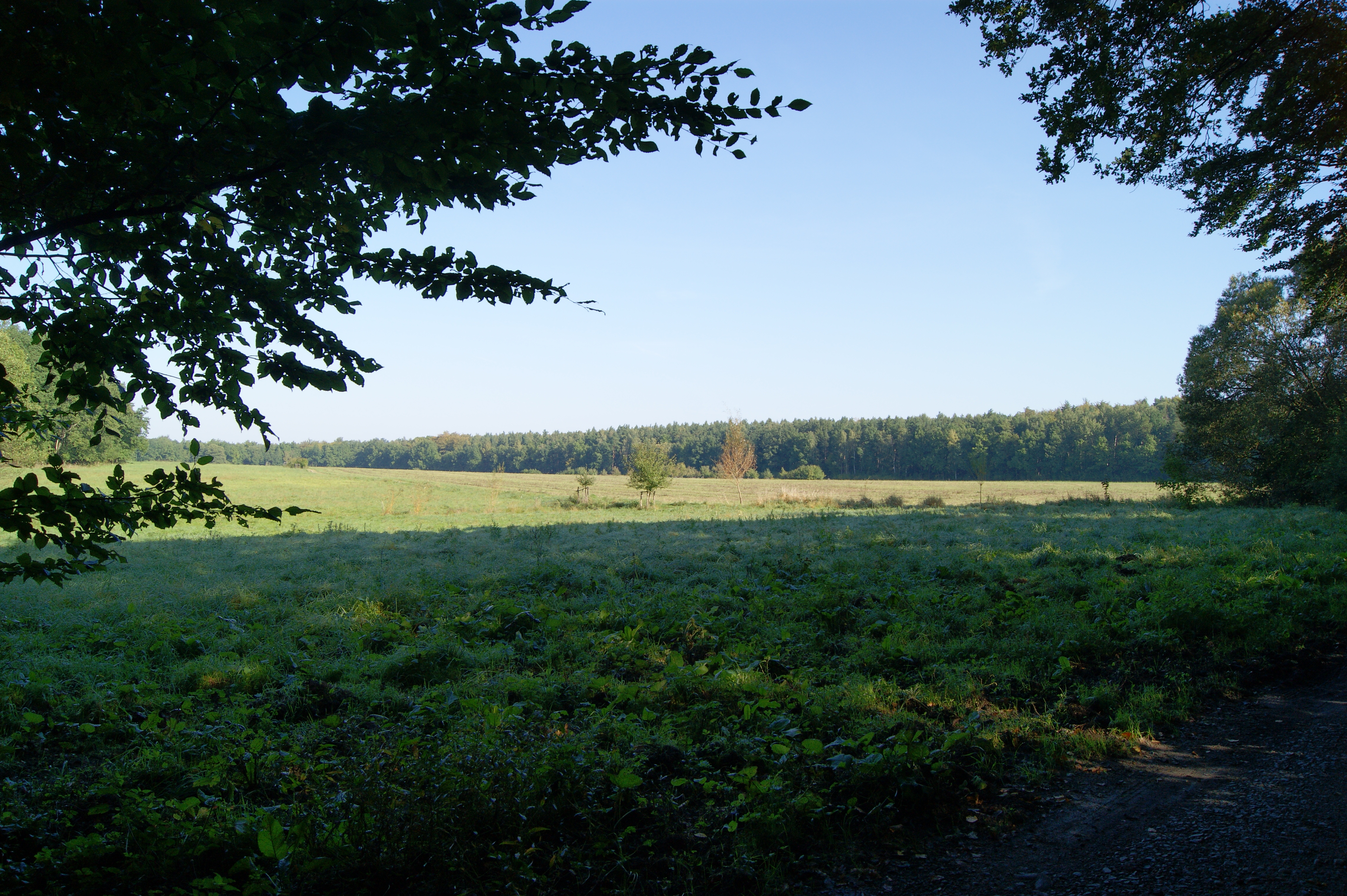 Langebrücker Hofewiese in der Dresdner Heide (Blick von der Mitte in Richtung Norden)